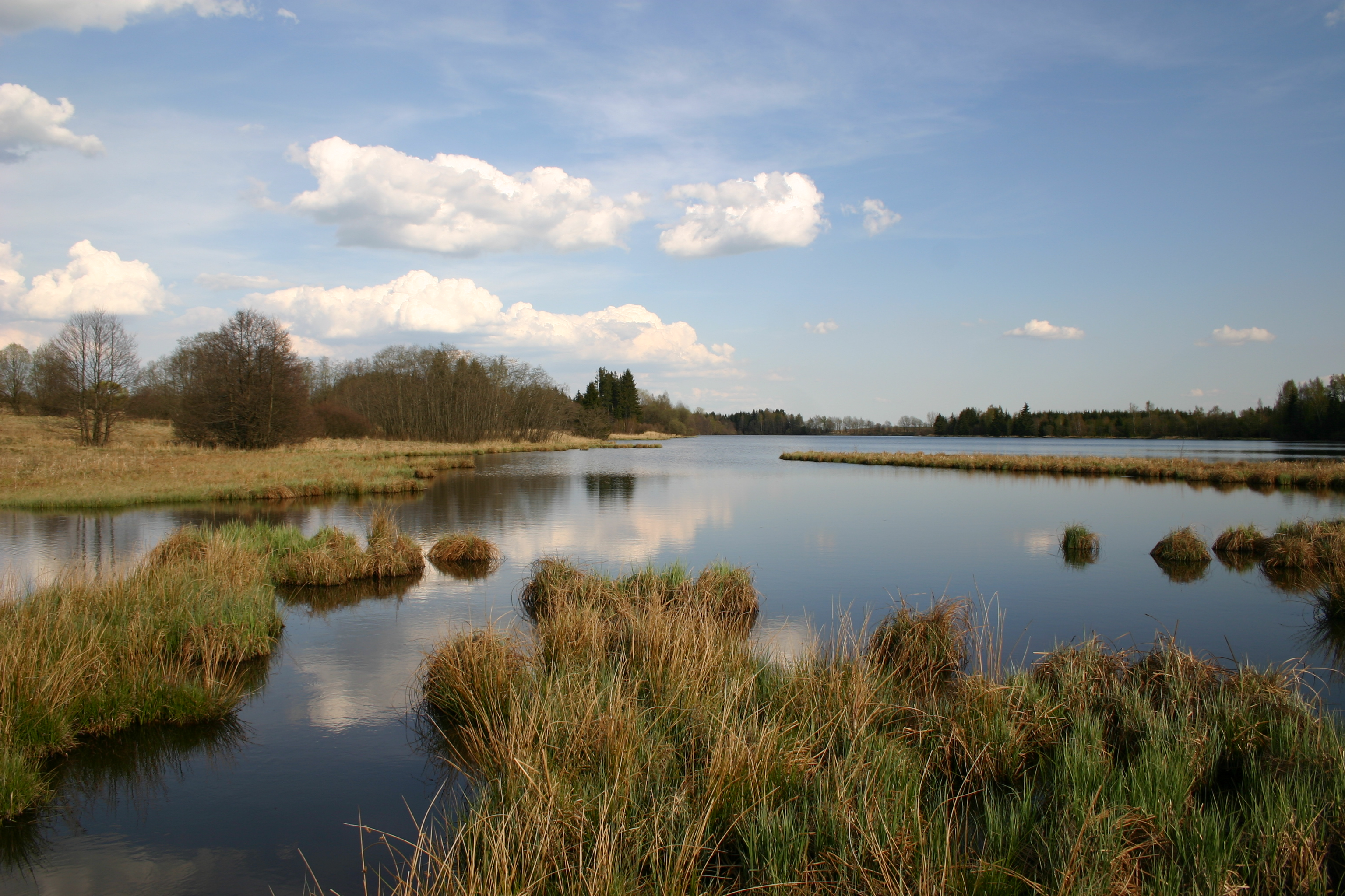 Břehy Podhorní nádrže.